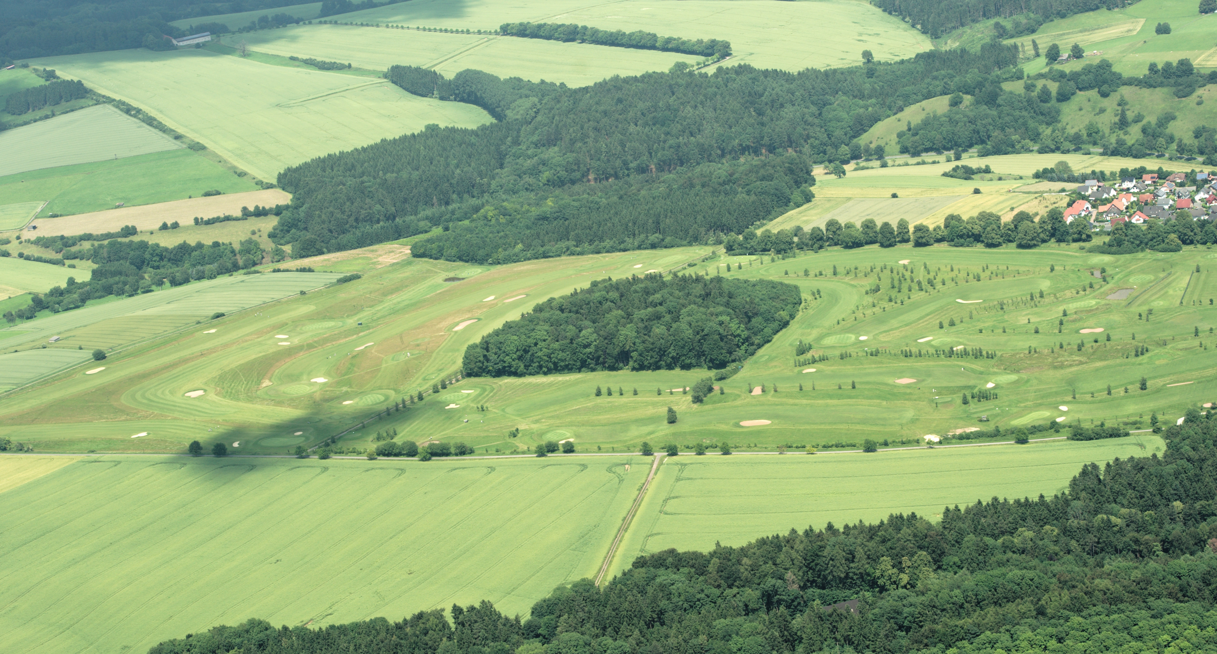 Fotoflug Sauerland-Ost: Golfplatz des TuS Westheim Marsberg, nördlicher Ortsrand von Westheim und Naturschutzgebiet Dahlsberg (HSK-388) und Teile des Naturschutzgebietes Halbtrockenrasen am Dahlberg (HSK-025). The making of this document was supported by the Community-Budget of Wikimedia Germany.